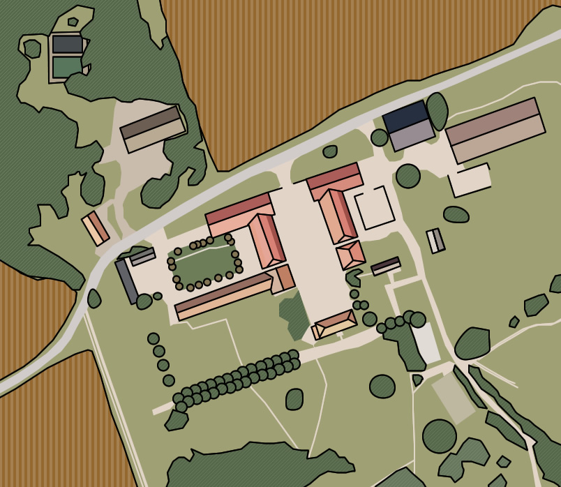 Oversigtsbillede over Kattrup Gods som det så ud på et luftfoto i 2005. Godset ligger ved Tissø på Sjælland - Overview of the Kattrup estate, Zealand, Denmark. Lavet af Mathias Ystrøm